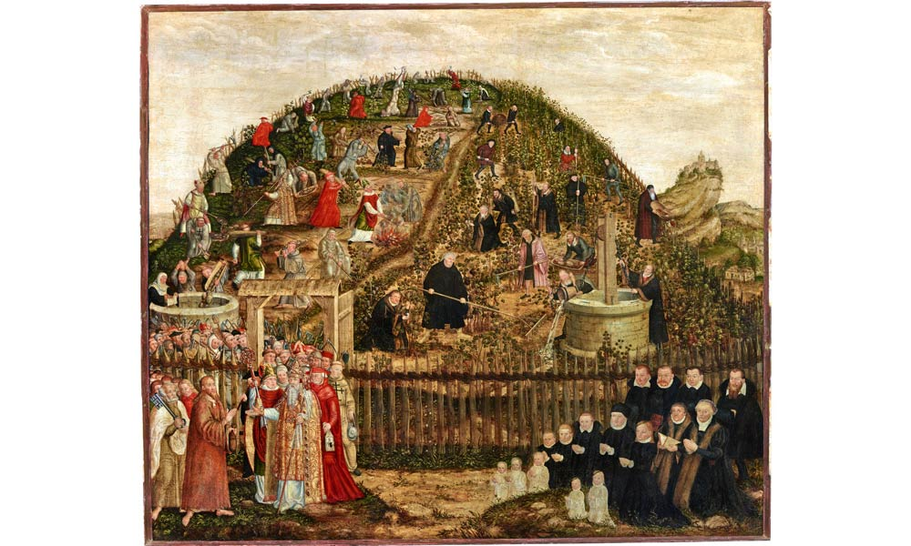 „Weinberg des Herrn“ Epitaph für Paul Eber in der Stadtkirche der Lutherstadt Wittenberg, (1569)